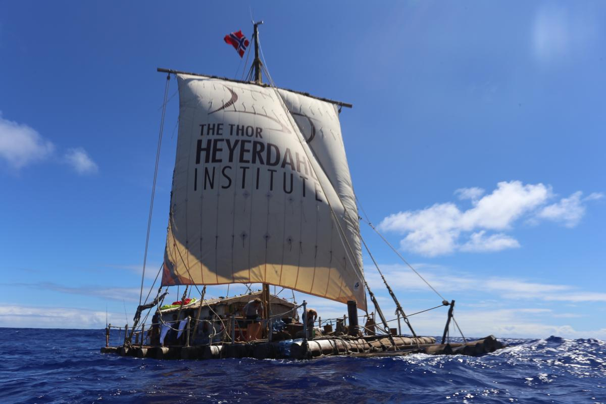 Balsaflåten Tupaq Yupanqui på vei fra Peru til Påskeøya desember 2015